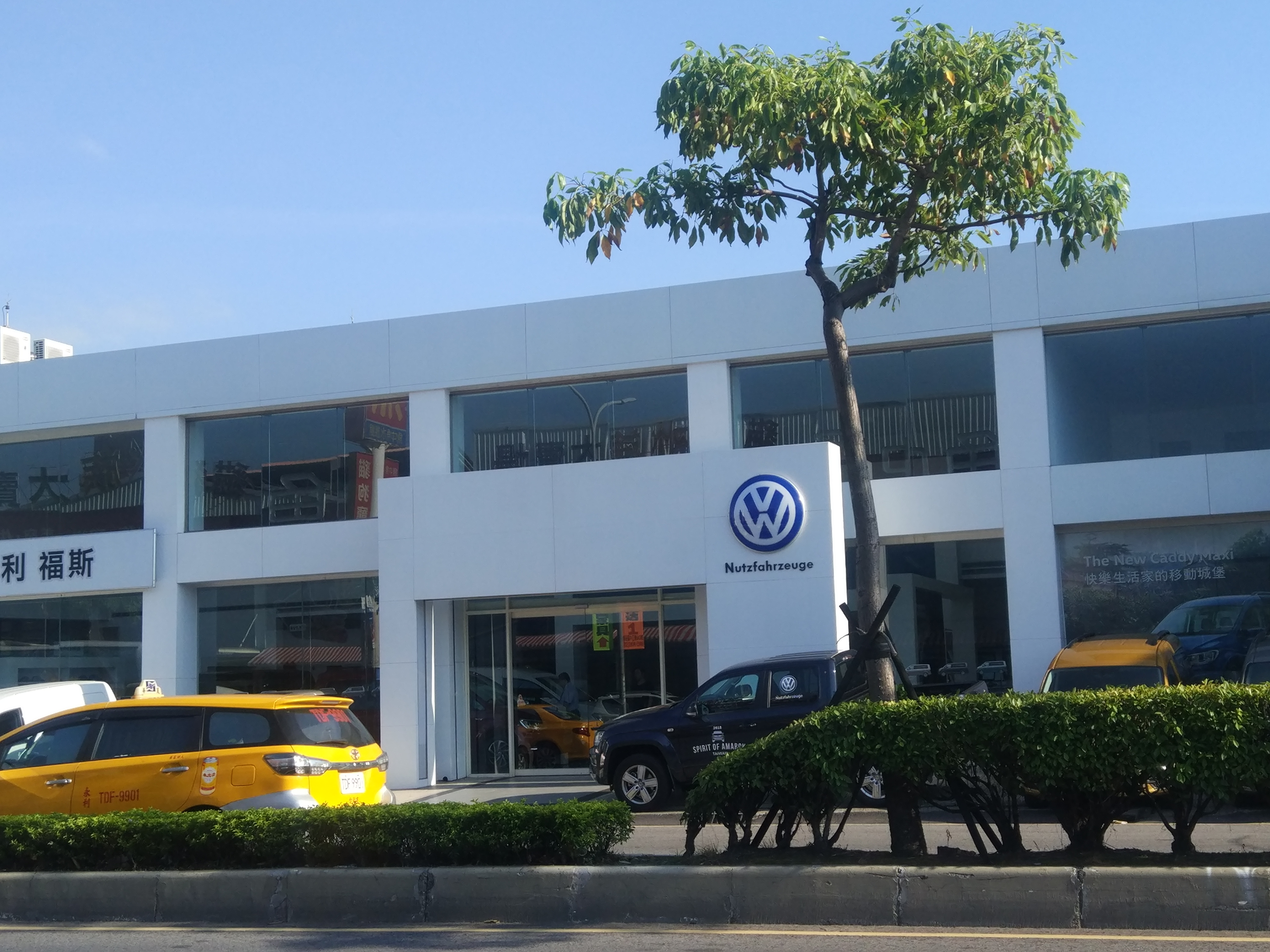 中文（台灣）: 福斯汽車代理商 台灣新北市新莊區